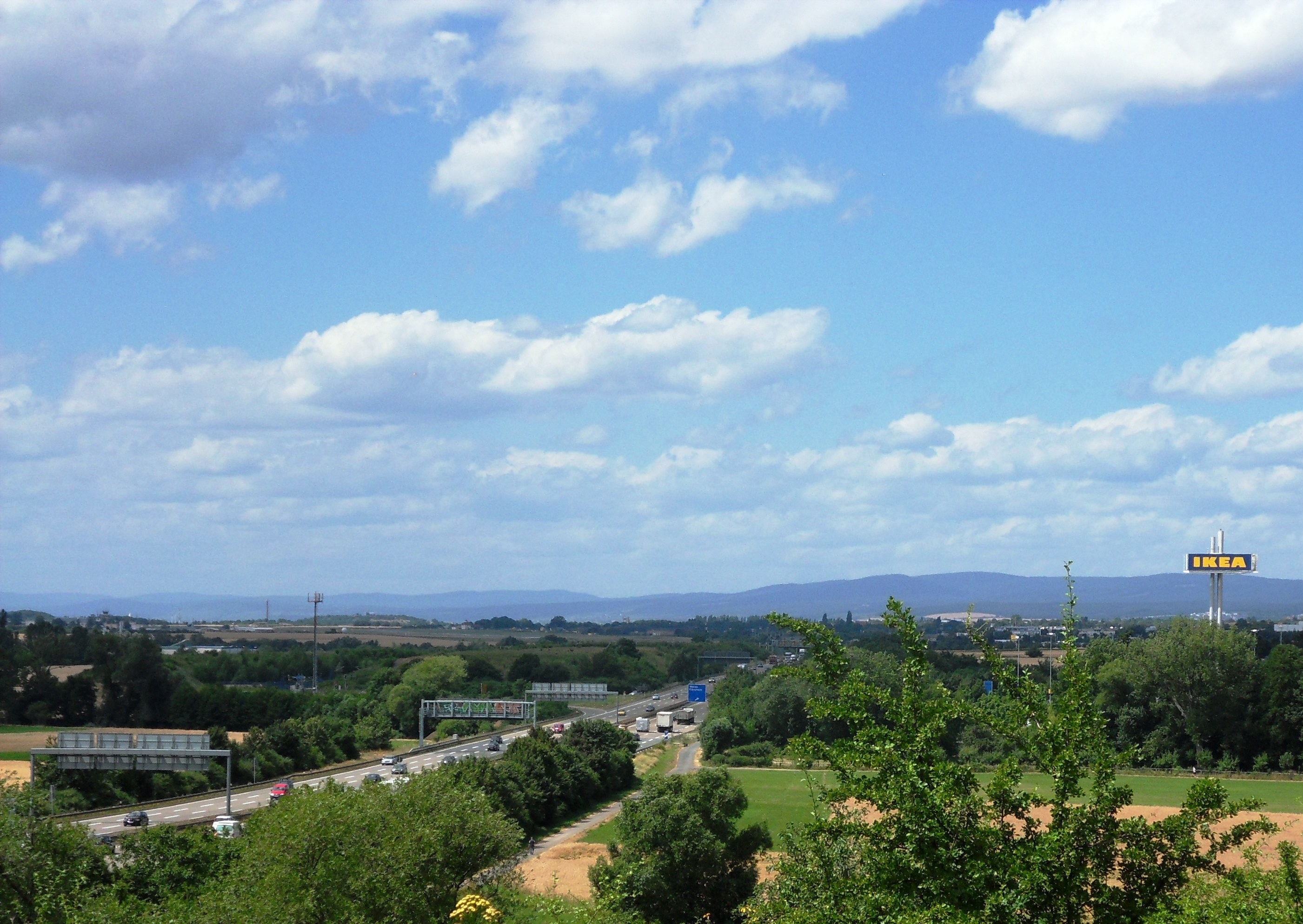 Blick vom Wandersmann-Denkmal am Wiesbadener Kreuz nach Westen über die Bundesautobahn 66 bei Hofheim-Wallau, im Hintergrund die Berge von Taunus und Hunsrück